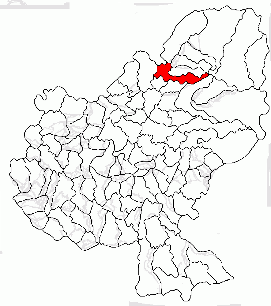 Categorie:Hărţi ale judeţului Mureş